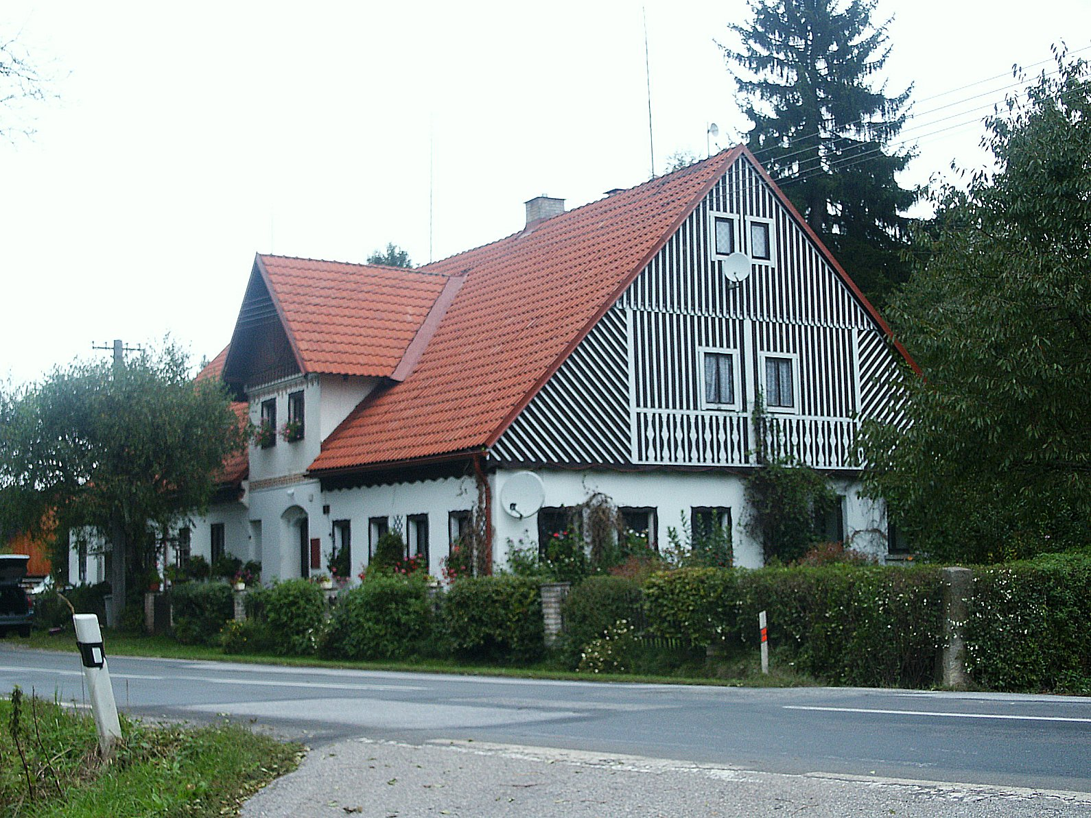 Dolní Olešnice - dům č.p.78